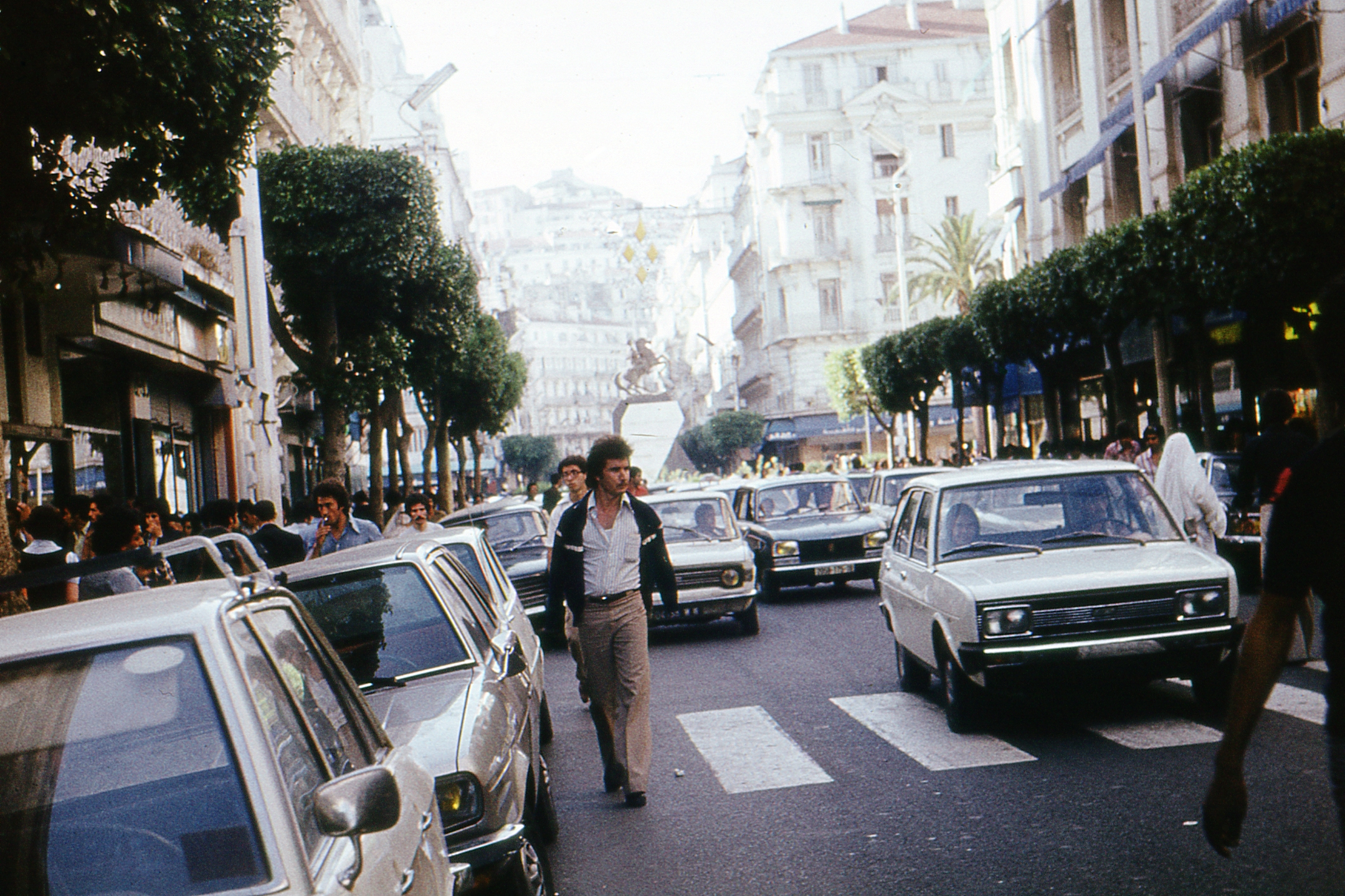 столица 1978